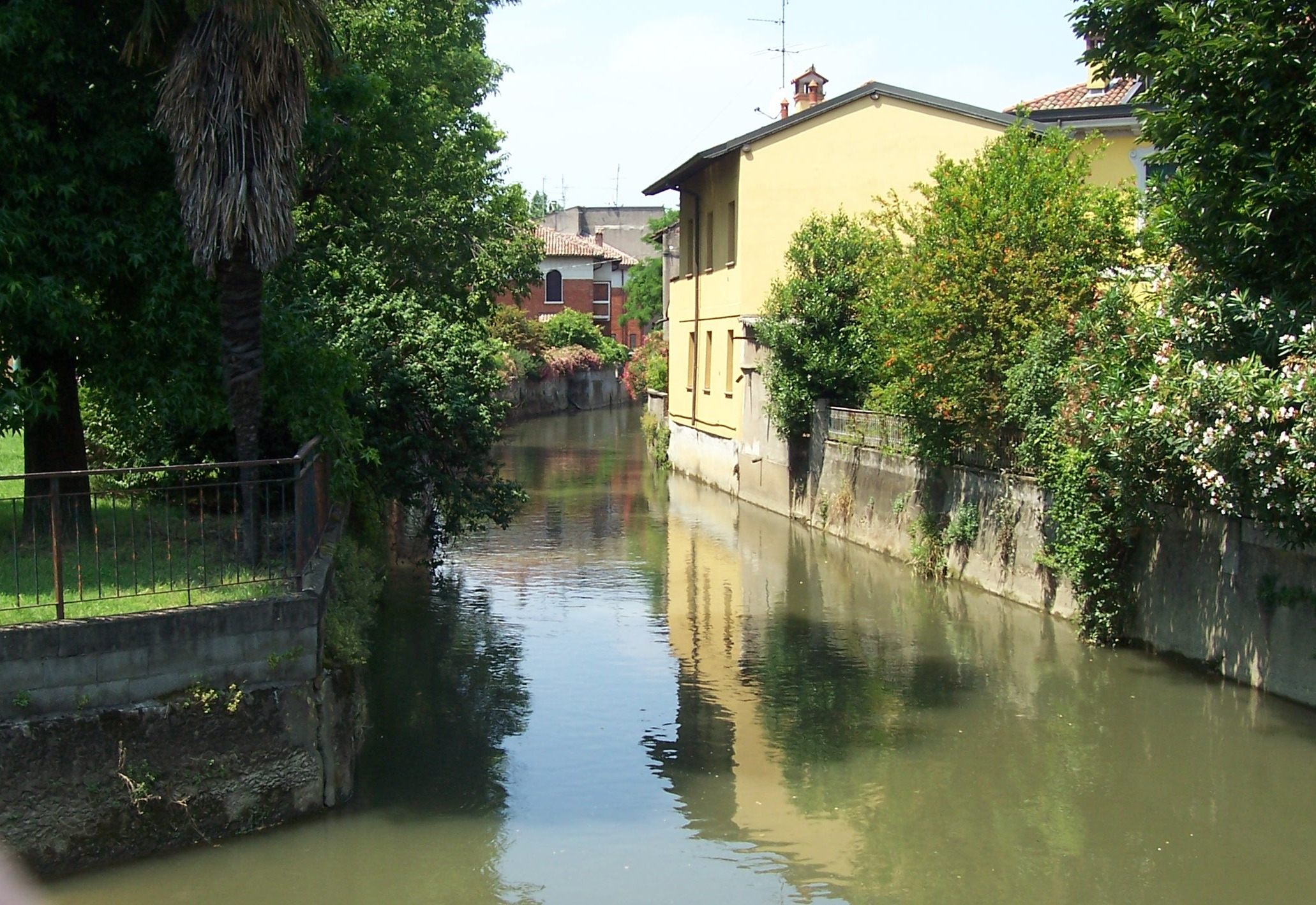 La Bareggia NEL centro di Binasco